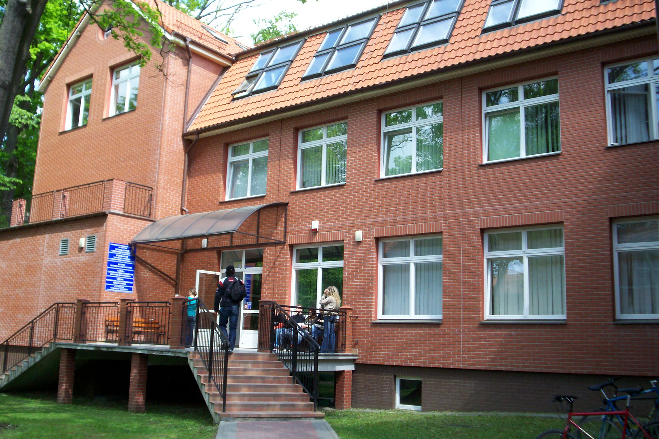 Wydział Geodezji i Gospodarki Przestrzennej, UWM w Olsztynie, ul. Prawocheńskiego 15, blok 25A